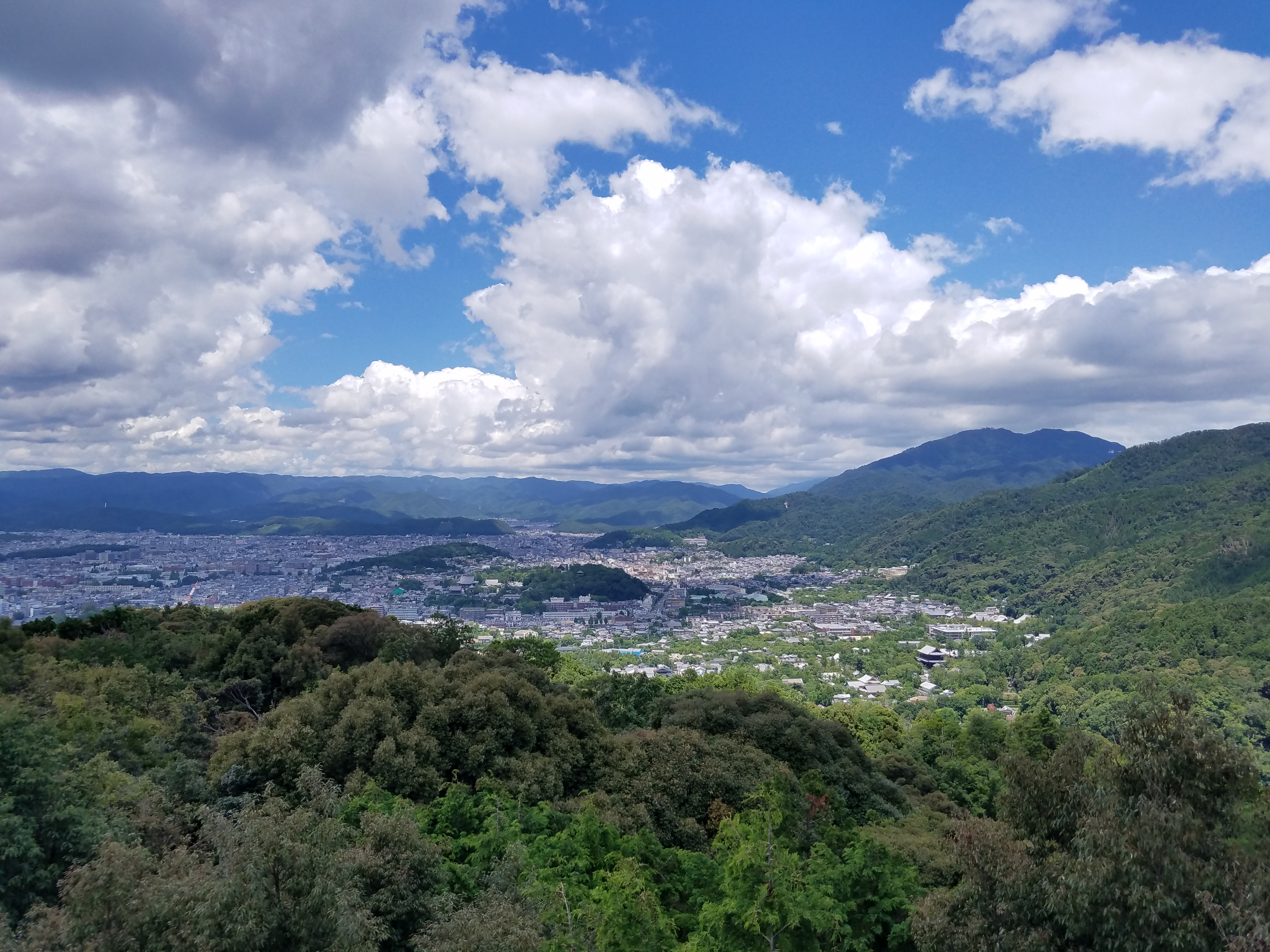 2019年7月 将軍塚青龍殿大舞台より北方を撮影